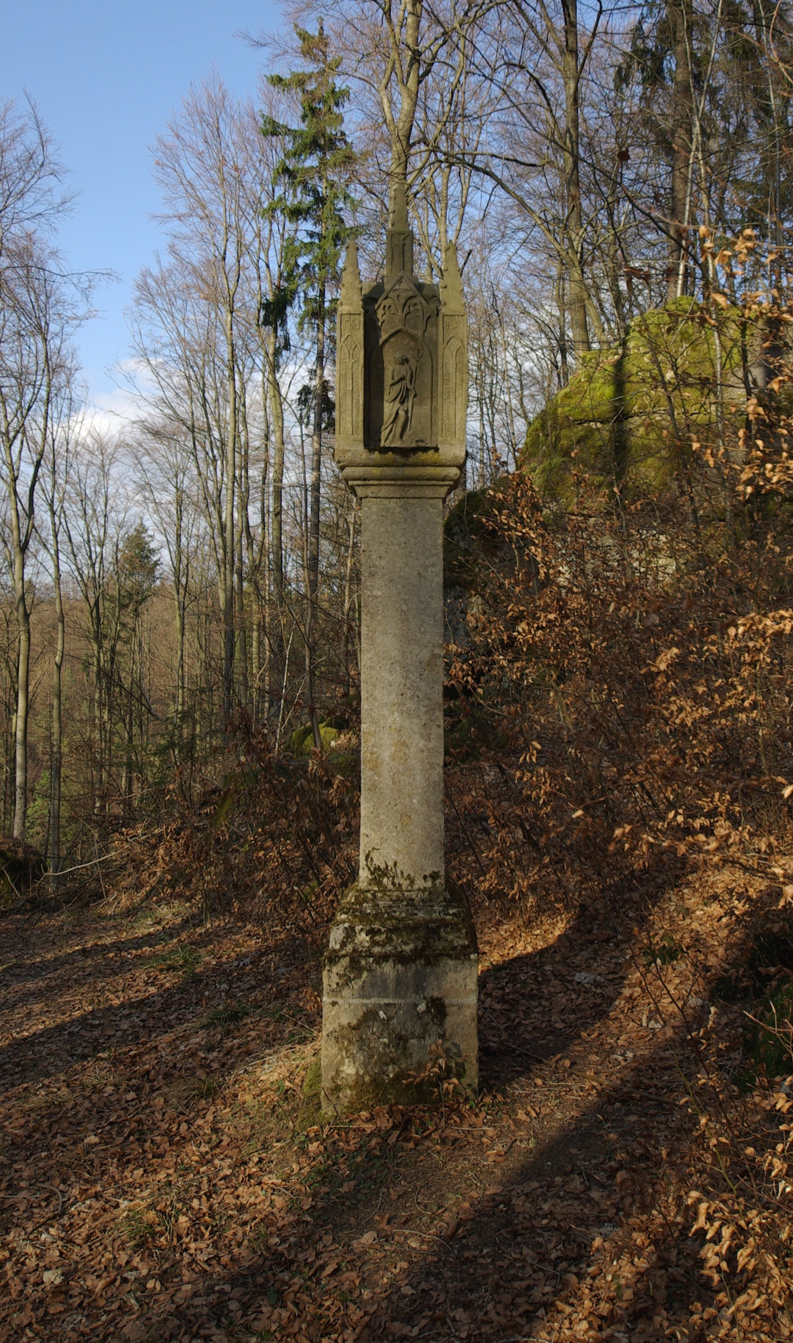 Schloss Greifenstein in der Fränkischen Schweiz, Bildstock „Streitberger Hans”